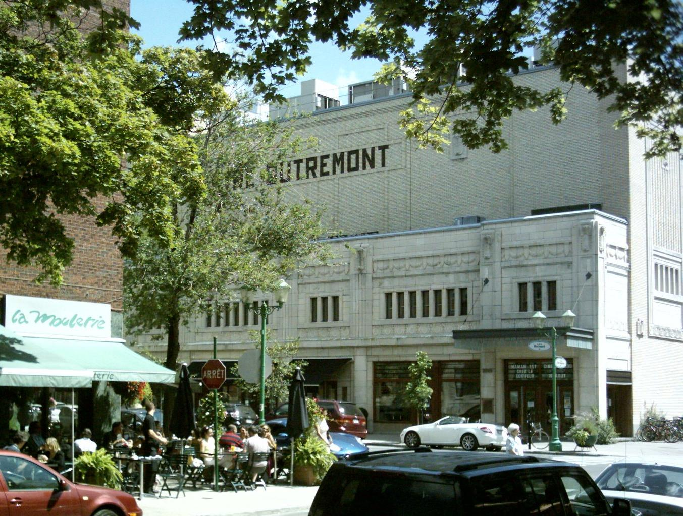 Le Théâtre Outremont sur la rue Bernard avoisine les terrasses des restaurants.